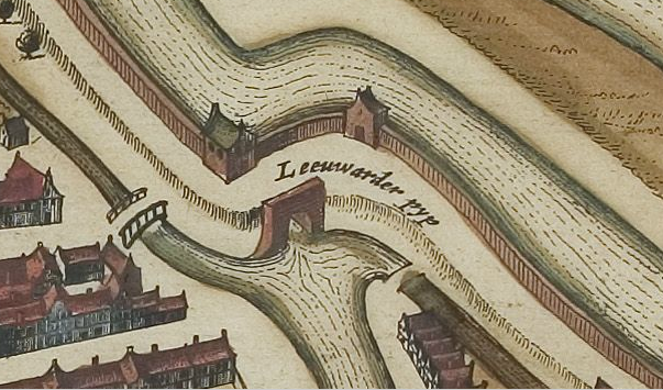 Uitsnede van de Leeuwarderpijp